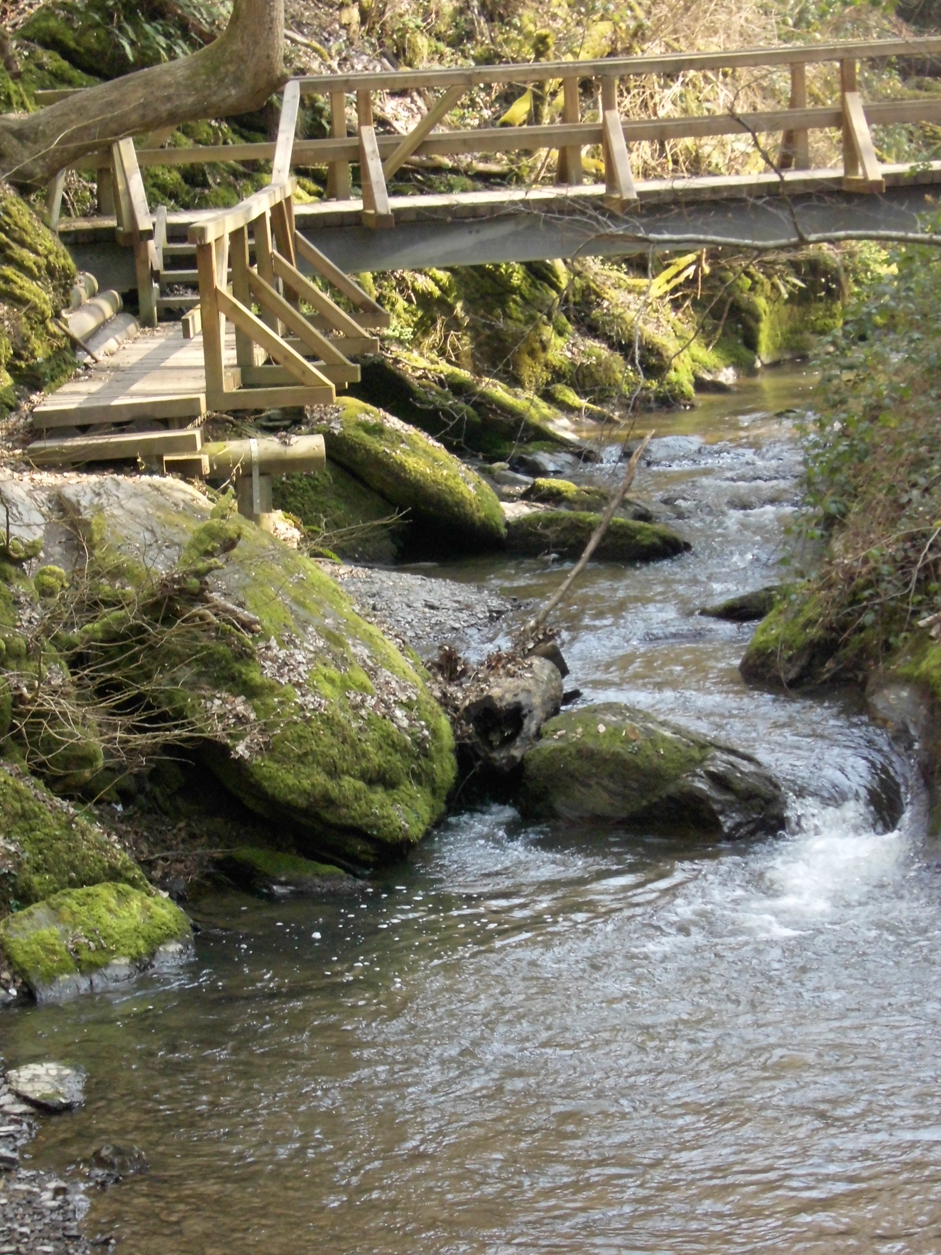 Holzsteg über den Ehrbach